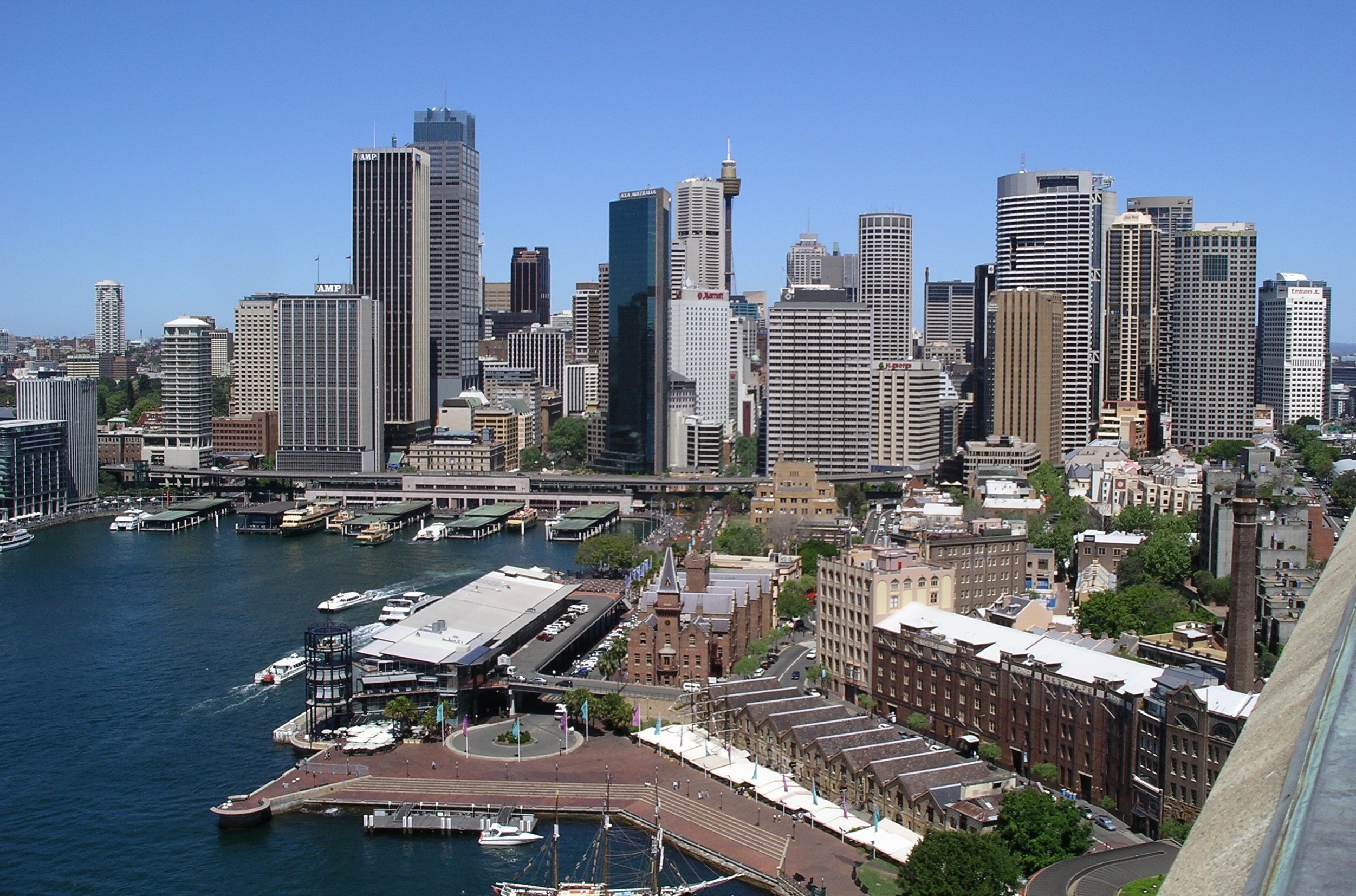 Sydney Skyline von der Harbour Bridge gesehen, Blickrichtung Circular Quai.